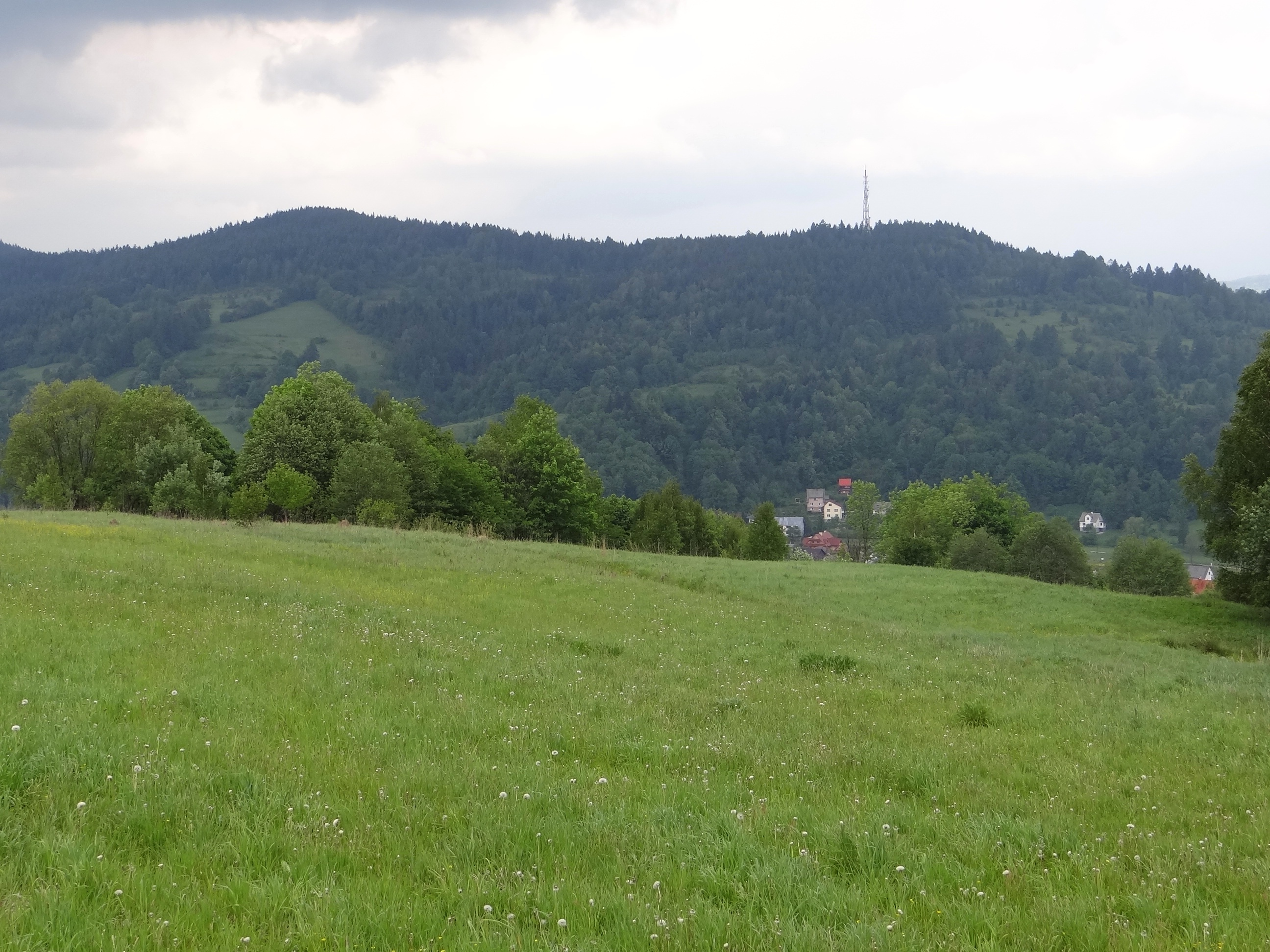 Od lewej: Wojewodowa Góra i Czepelówka w Paśmie Solnisk